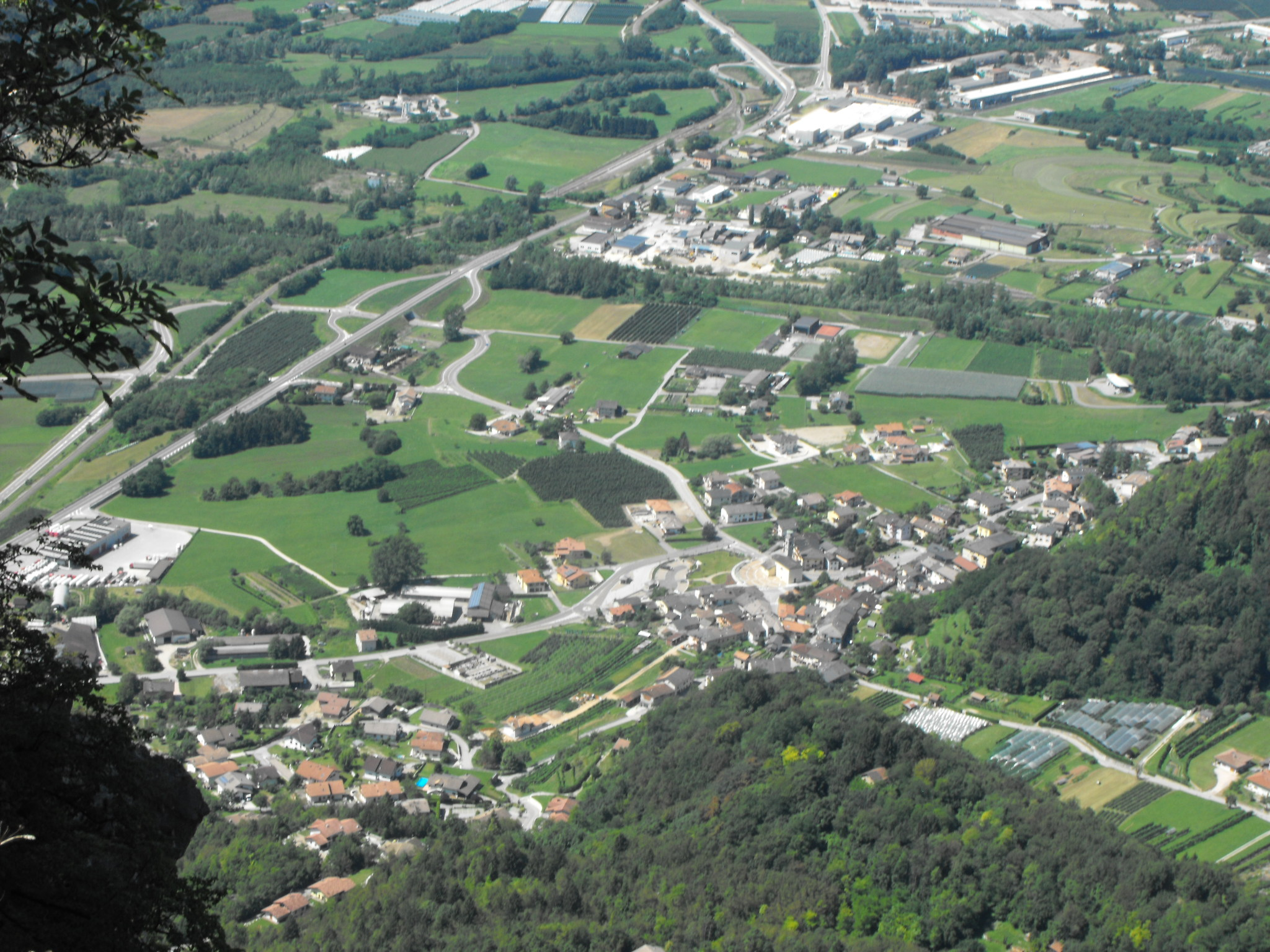 Vista dell'abitato di Agnedo (Comune di Villa Agnedo, Trentino-Alto Adige) dal versante ovest del Monte Lefre